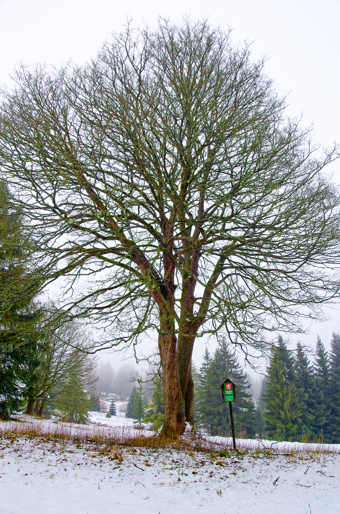 památný strom - Klen v Horní Oboře u Šindelové, okres Sokolov